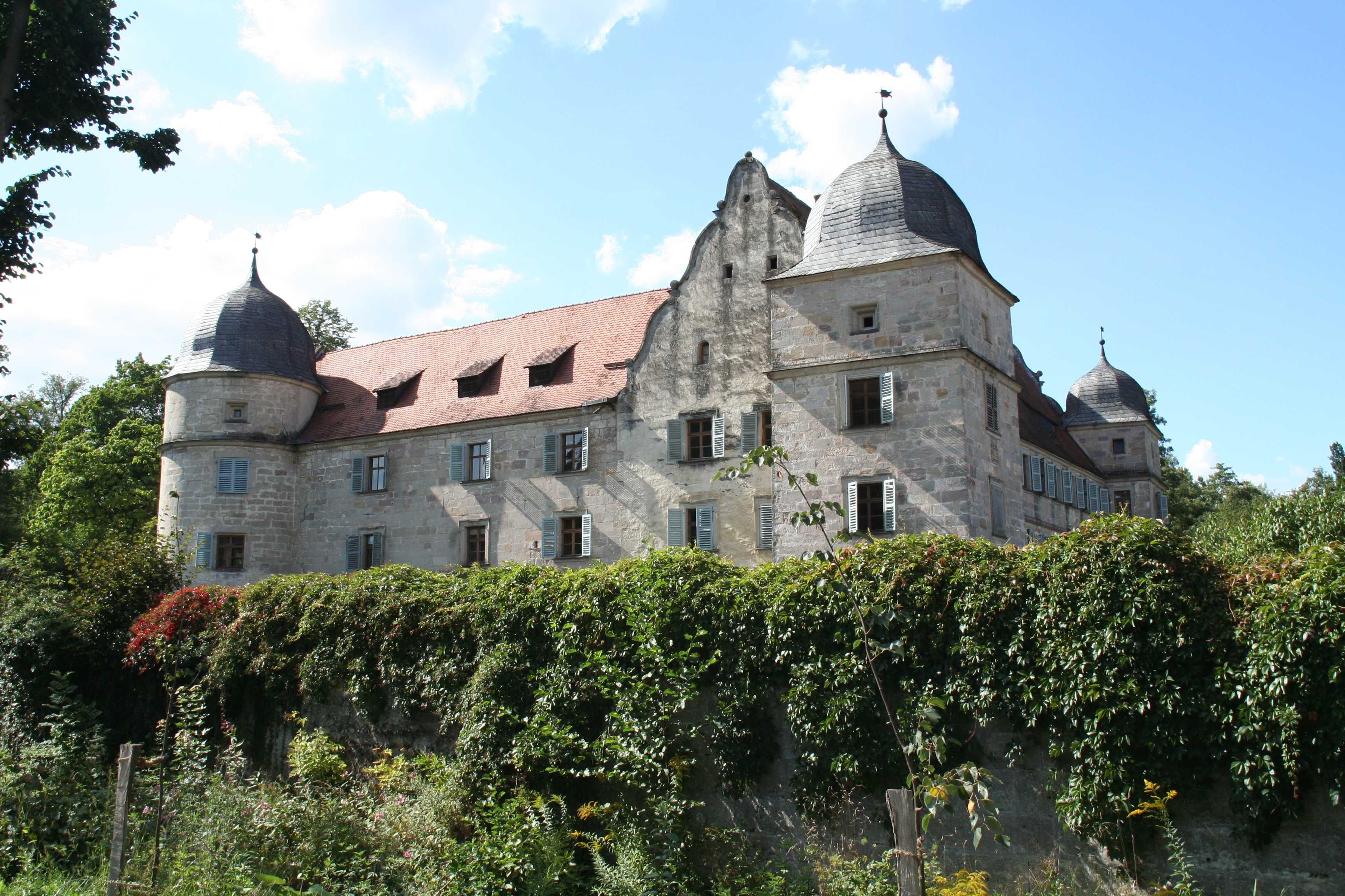 Wasserschloss Mitwitz (Ost-Seite) im Landkreis Kronach in Bayern